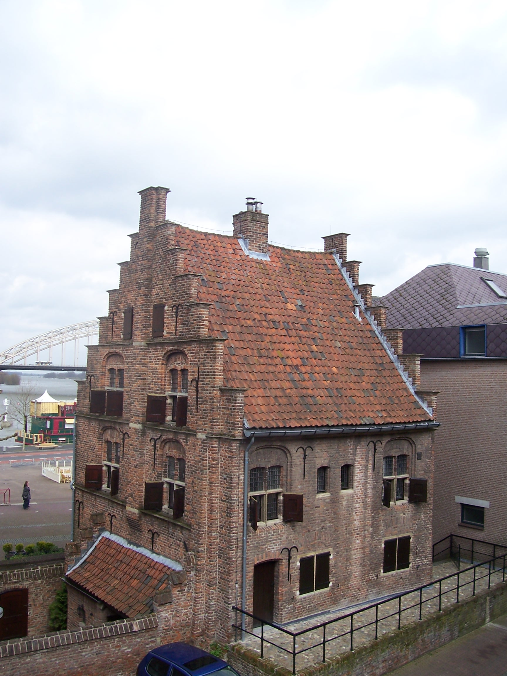 Het Besiendershuis (ca. 1525) aan de Waalkade in Nijmegen. De Besiender controleerde de lading en schatte vervolgens de tolbetaling.